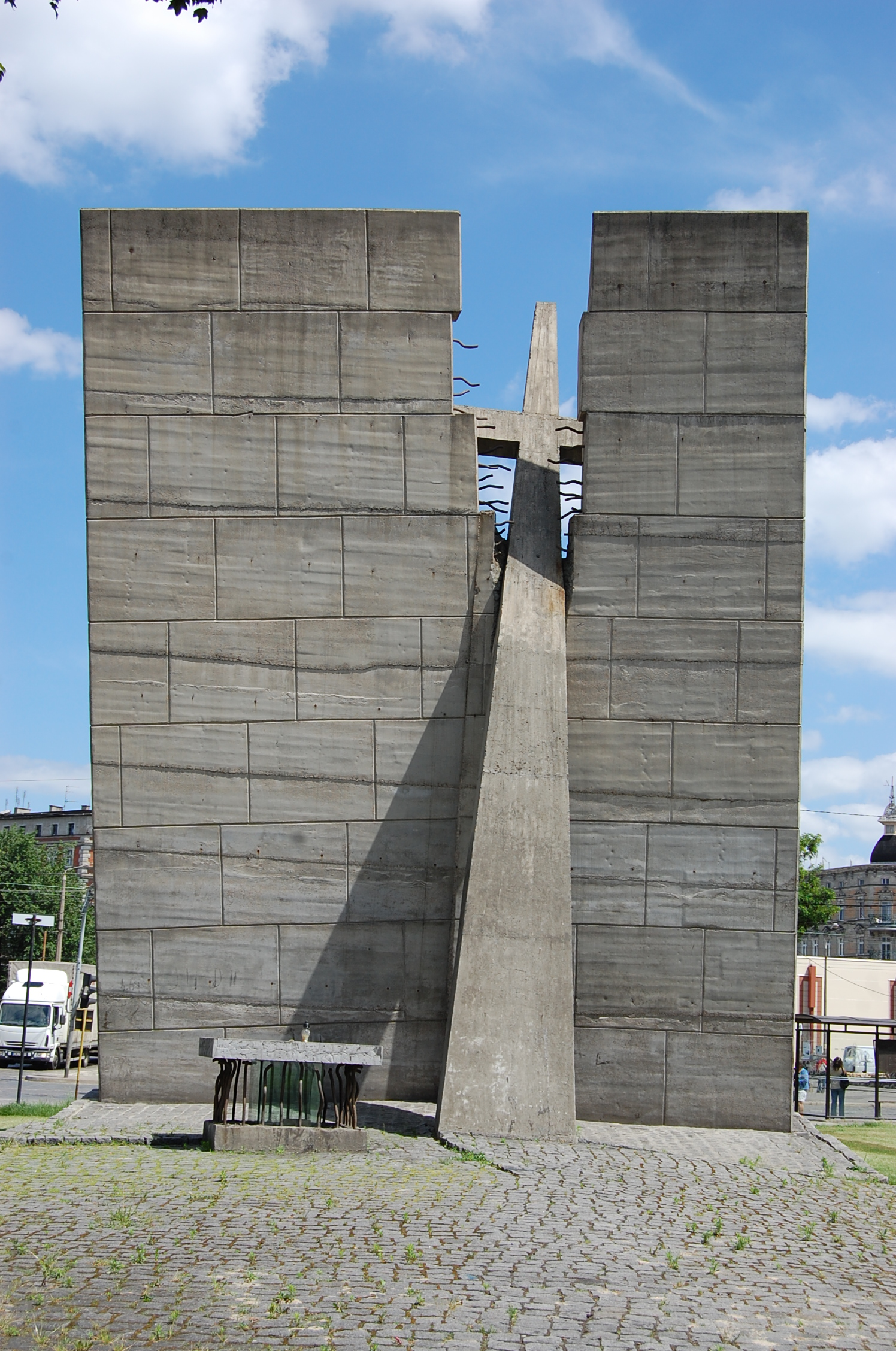 Pomnik sybiraków we Wrocławiu